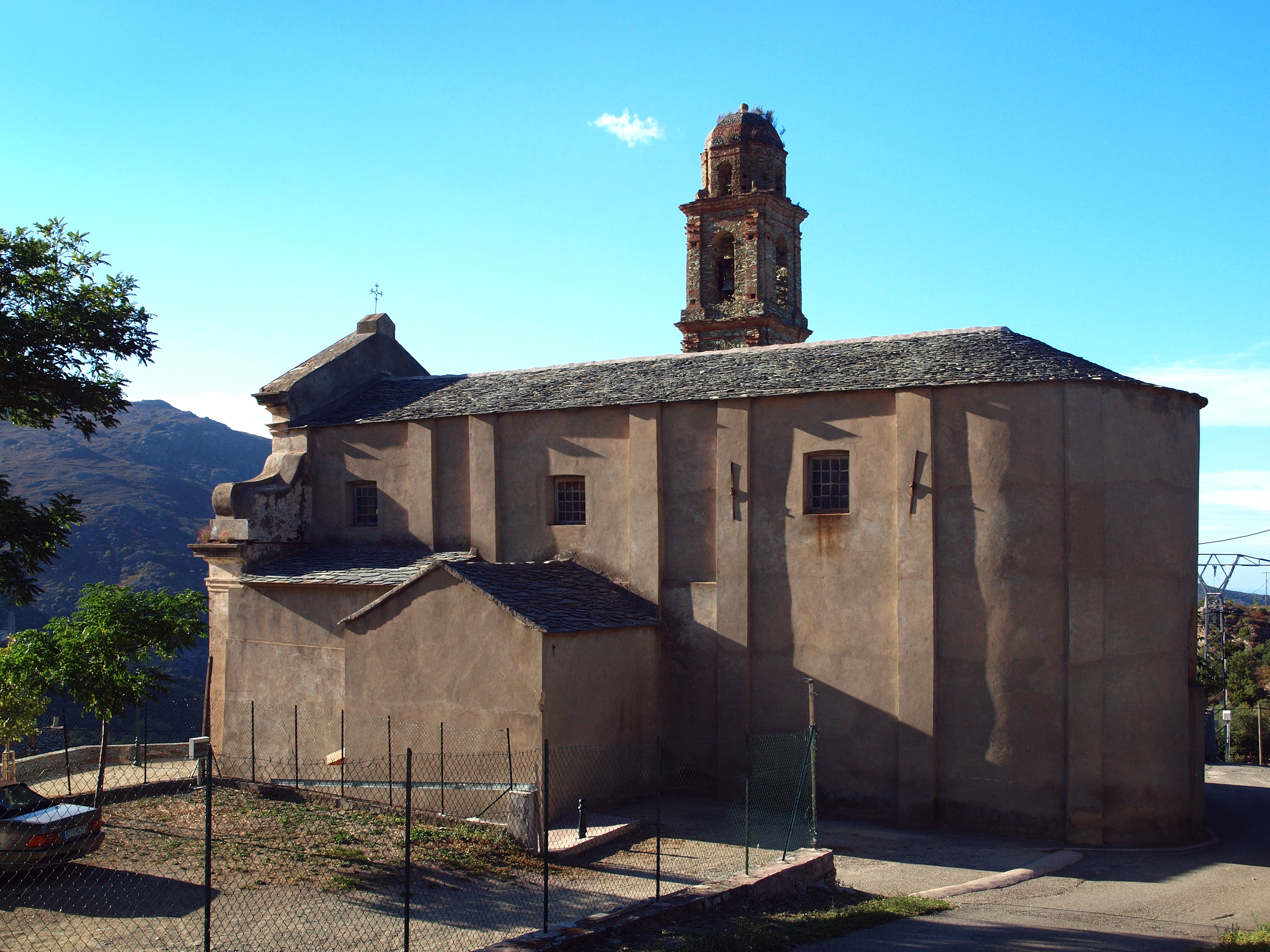 Piève, Nebbio (Corse) - Façade nord de l'église paroissiale San Quilico. Le cloché est éloigné de l'église